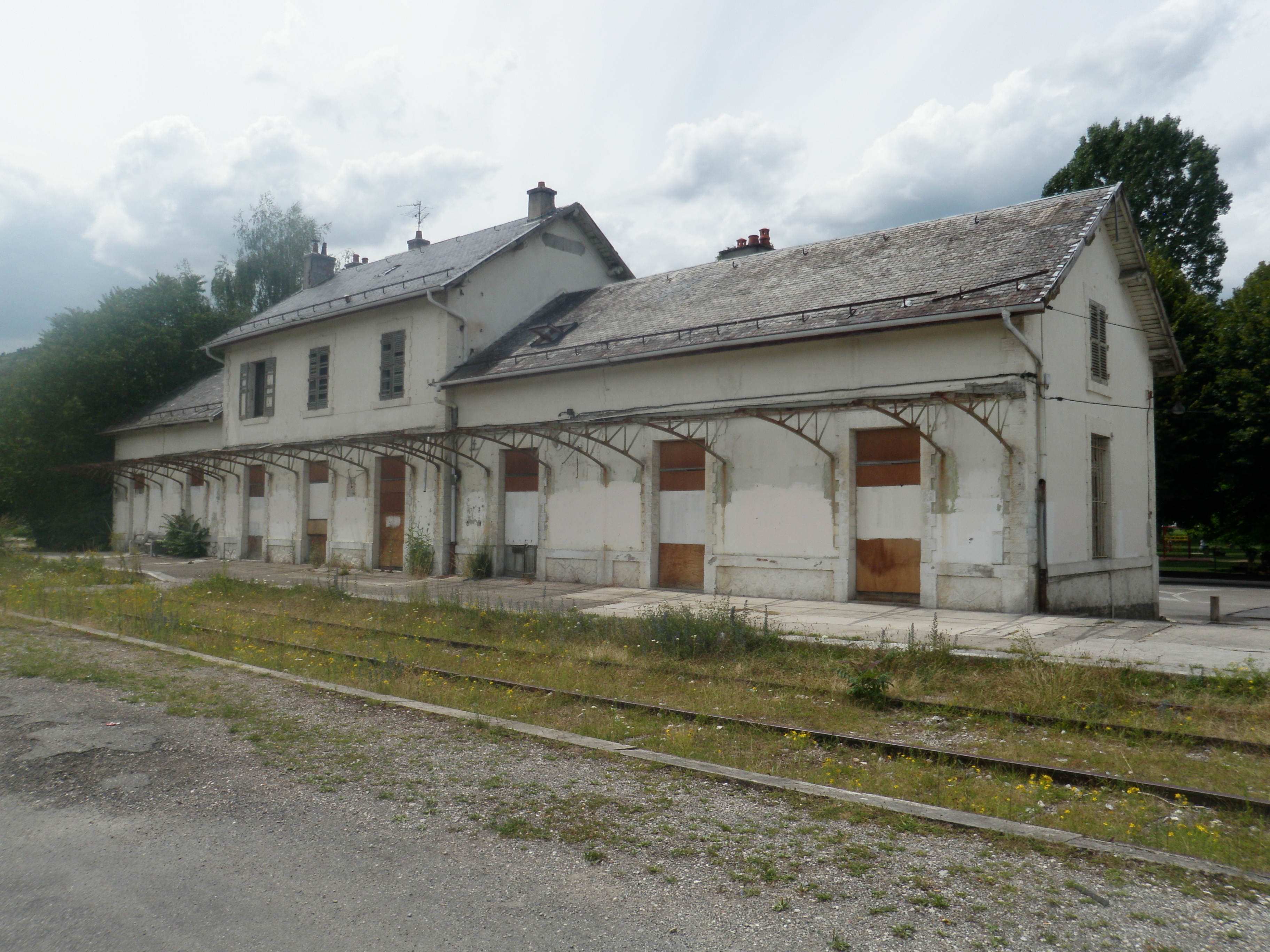 Bahnhof Divonne-les-Bains, Gleisseite